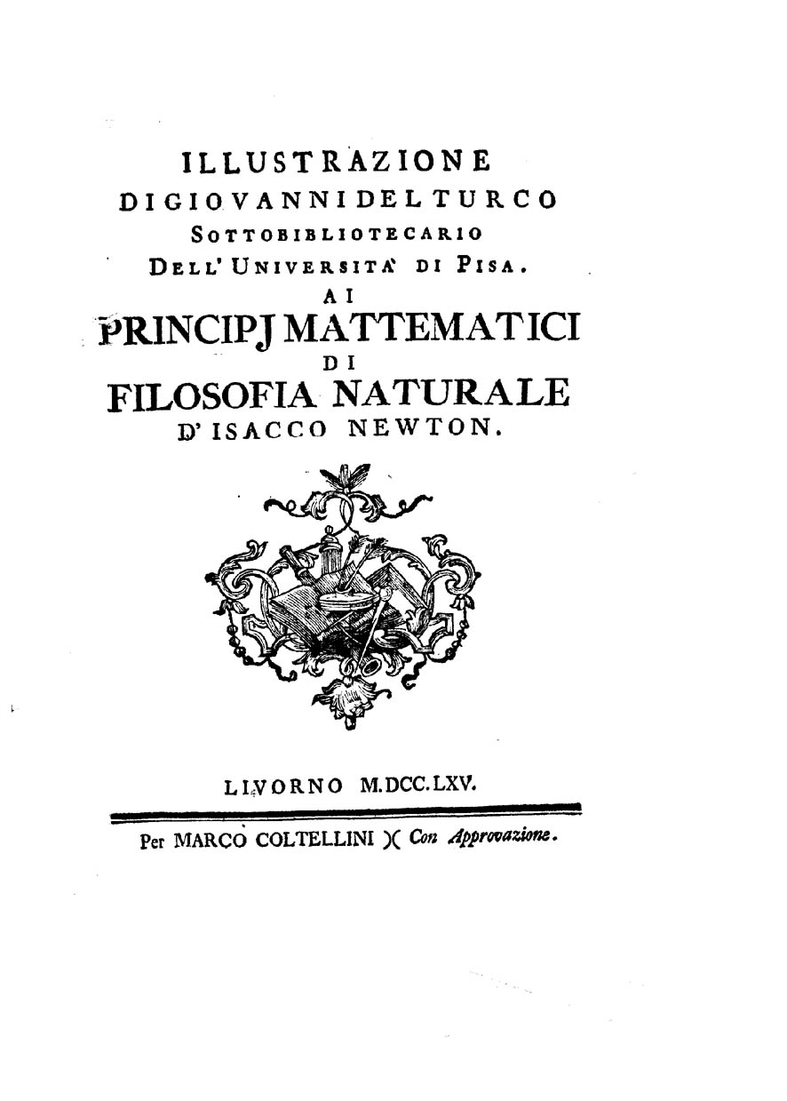 Illustrazione di Giovanni Del Turco sottobibliotecario dell'Università di Pisa. Ai Principj mattematici di filosofia naturale d'Isacco Newton. - Livorno : per Marco Coltellini, 1765. - [4], 102, [2] p. ; 4º .